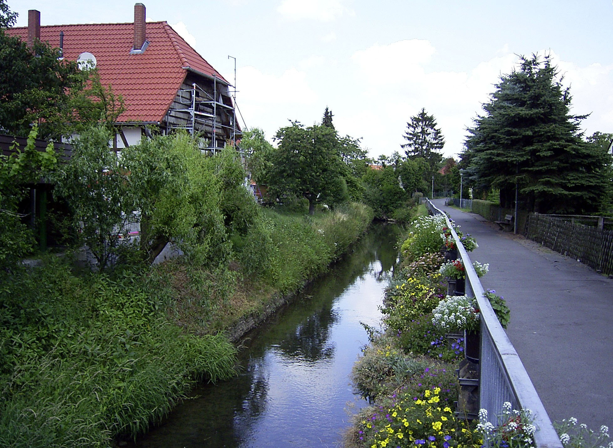 Die Aue in Rodenberg